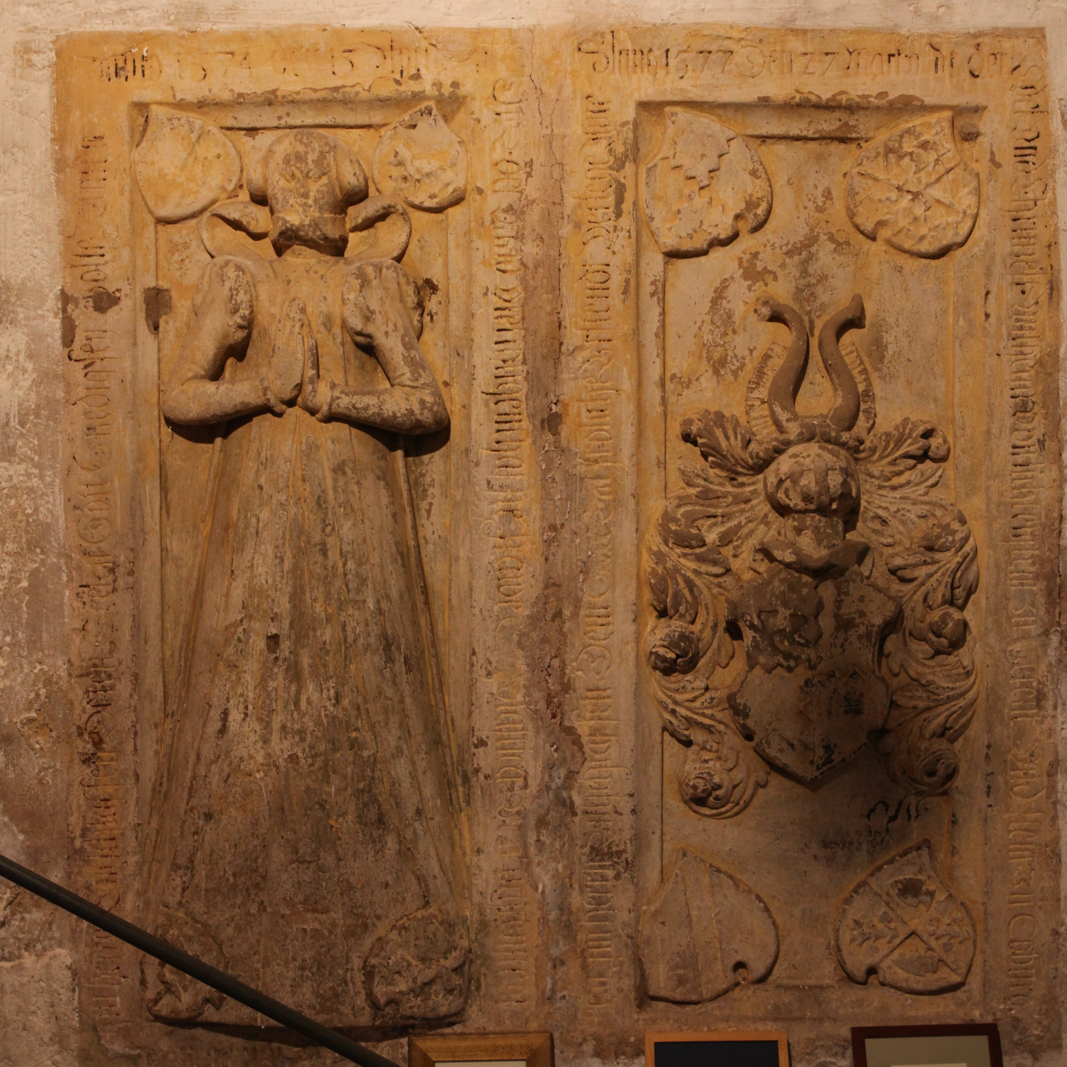 evangelisch-lutherische Kirche St. Pankratius in Schottenstein, Itzgrund